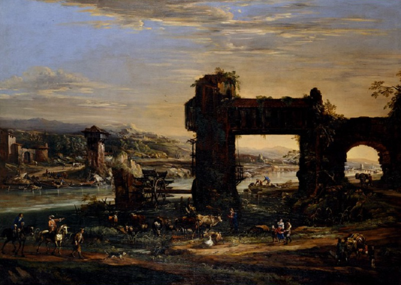 Paesaggio con fiume e mulino, olio su tela, 120 x 171 c, Museo civico di Palazzo Chiericati, Vicenza